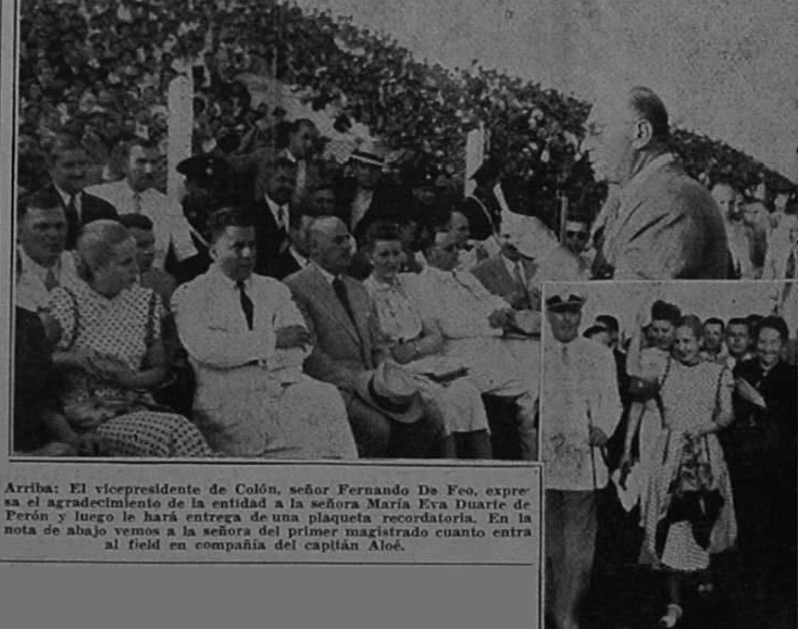 Reconocimiento a la primera dama Eva Duarte de Perón en el estadio de Colón, el 7 de Diciembre de 1947 en el partido entre Colón y Unión de Santa Fe.